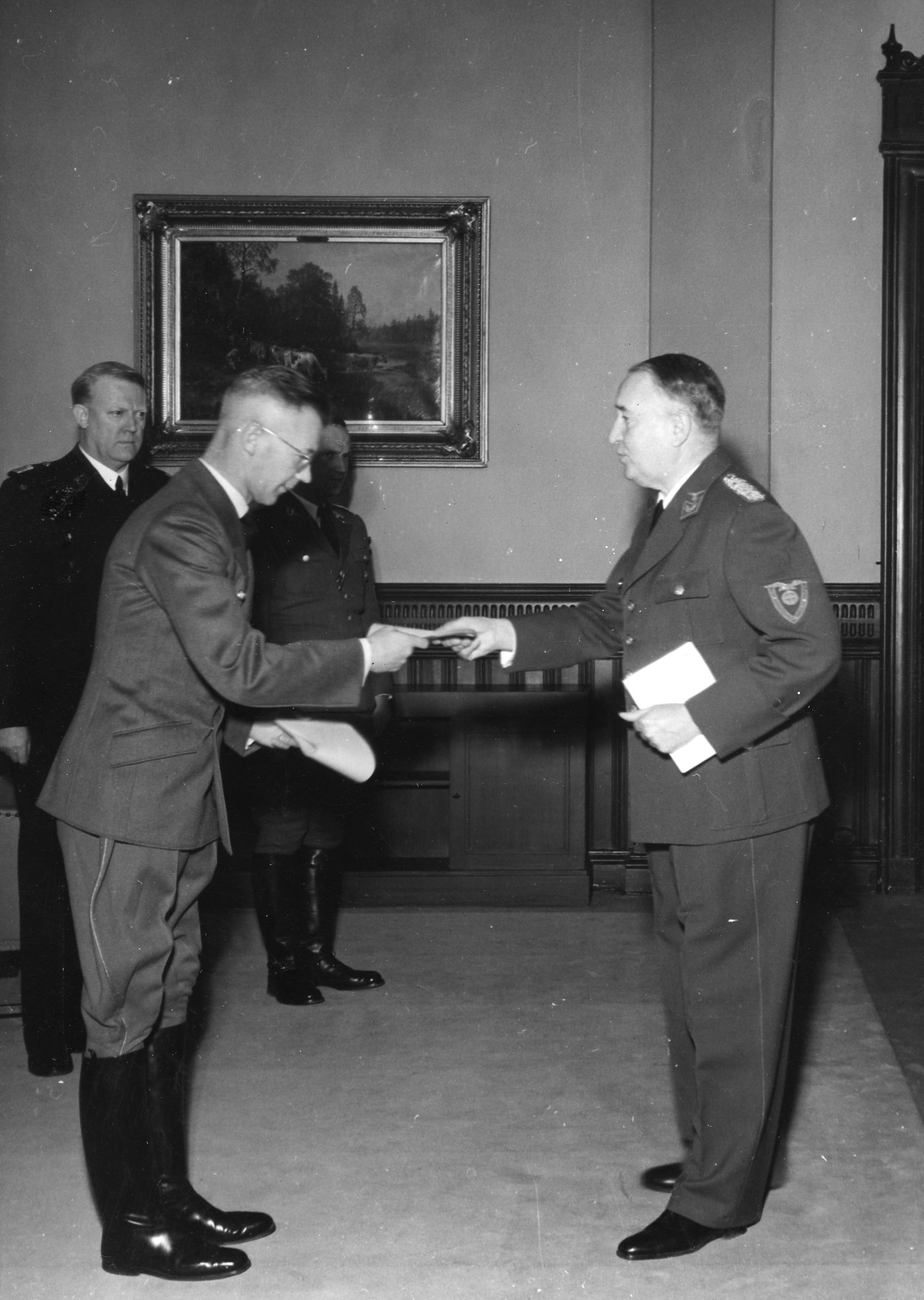 RA/RAFA-3309/U 39A/ /3 img165 «Statsakten» var en seremoni på Akershus slott i Oslo under andre verdenskrig 1. februar 1942 da rikskommissar Josef Terboven innsatte Vidkun Quisling, leder for Nasjonal Samling (NS), som «ministerpresident» i Norge, og de tyskkontrollerte kommissariske ministerne ble erstattet av «den nasjonale regjering» utgått fra NS. «Statsakten» markerte at Quisling fikk den formelle makta i Norge, og ved lov av 12. mars 1942 ble NS «statsbærende parti». Quisling hadde håp om at ordninga også skulle gi NS reell makt og føre til fred mellom Norge og Tyskland, men tysk tilsynsforvaltninga gjennom Reichskommissariat Norwegen fortsatte som før inntil frigjøringa 8. mai 1945.